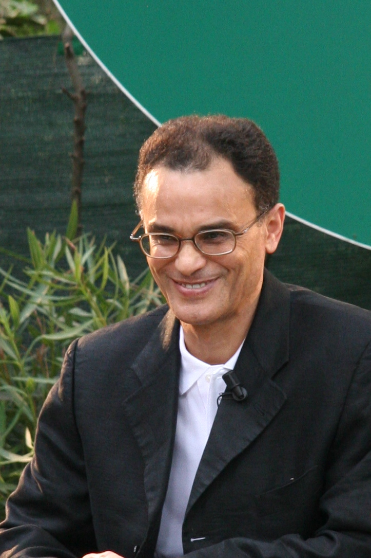 Il giornalista Magdi Cristiano Allam in un'immagine del 2008